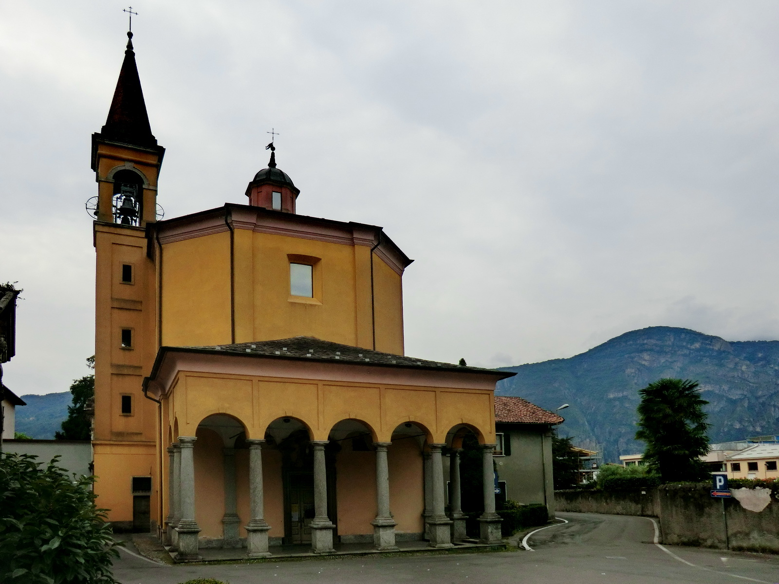 Santuario della Beata Vergine del Fiume Native nameSantuario della Beata Vergine del FiumeLocationMandello del Lario, Lombardia, ItalyCoordinates45° 54′ 55.63″ N, 9° 19′ 02.75″ E